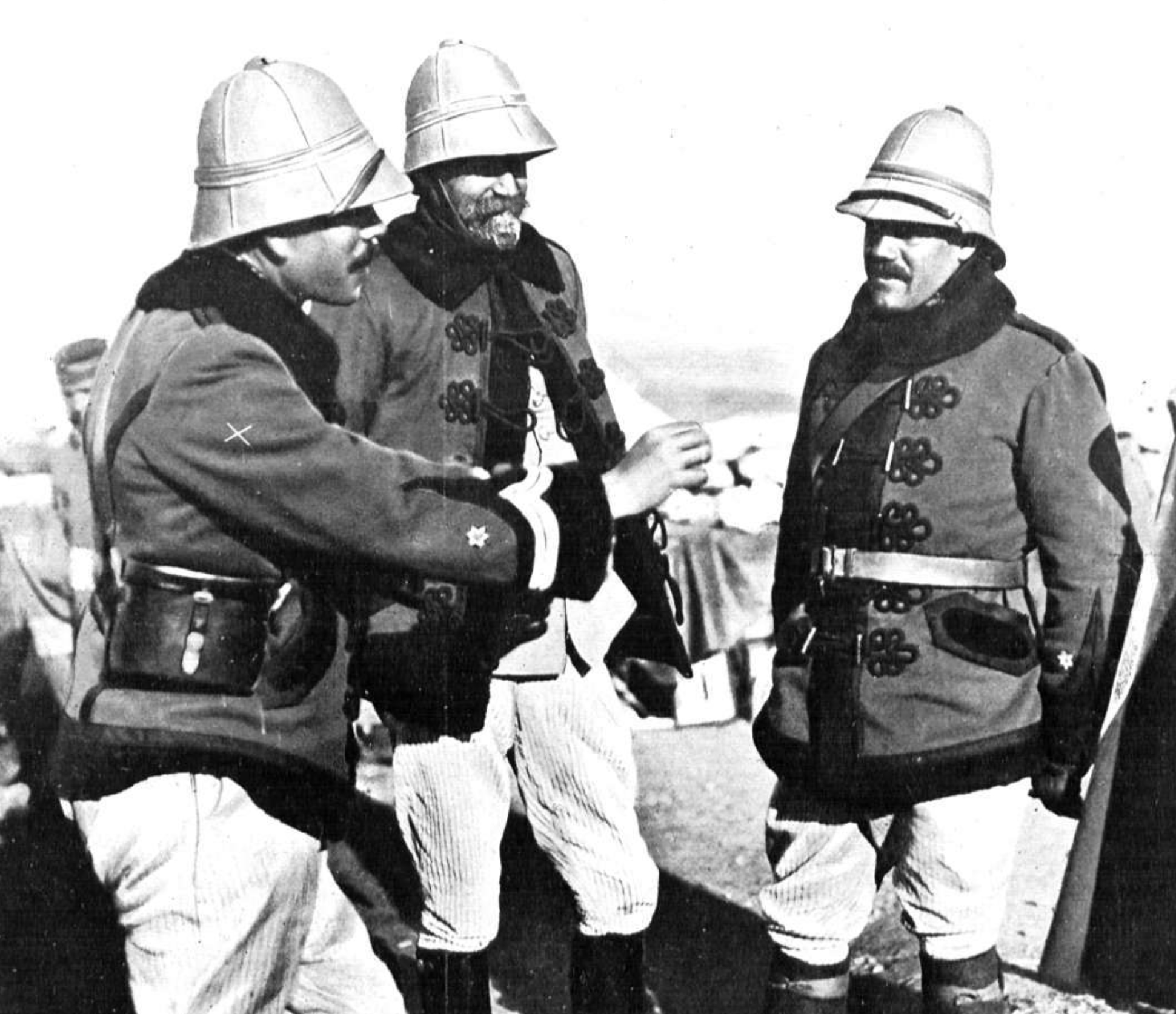 Pie de foto: "El coronel del regimiento de caballería de Alcántara, jefe de las fuerzas que dieron la carga sobre el zoco de El Yemis, de Beni-buhayi, hablando con el teniente marqués de Campollano y el teniente Serrano (X), horas antes de la brillante operación en que fue herido el último de los citados".